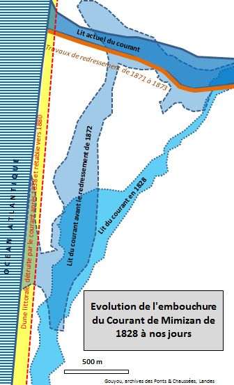 Reproduction